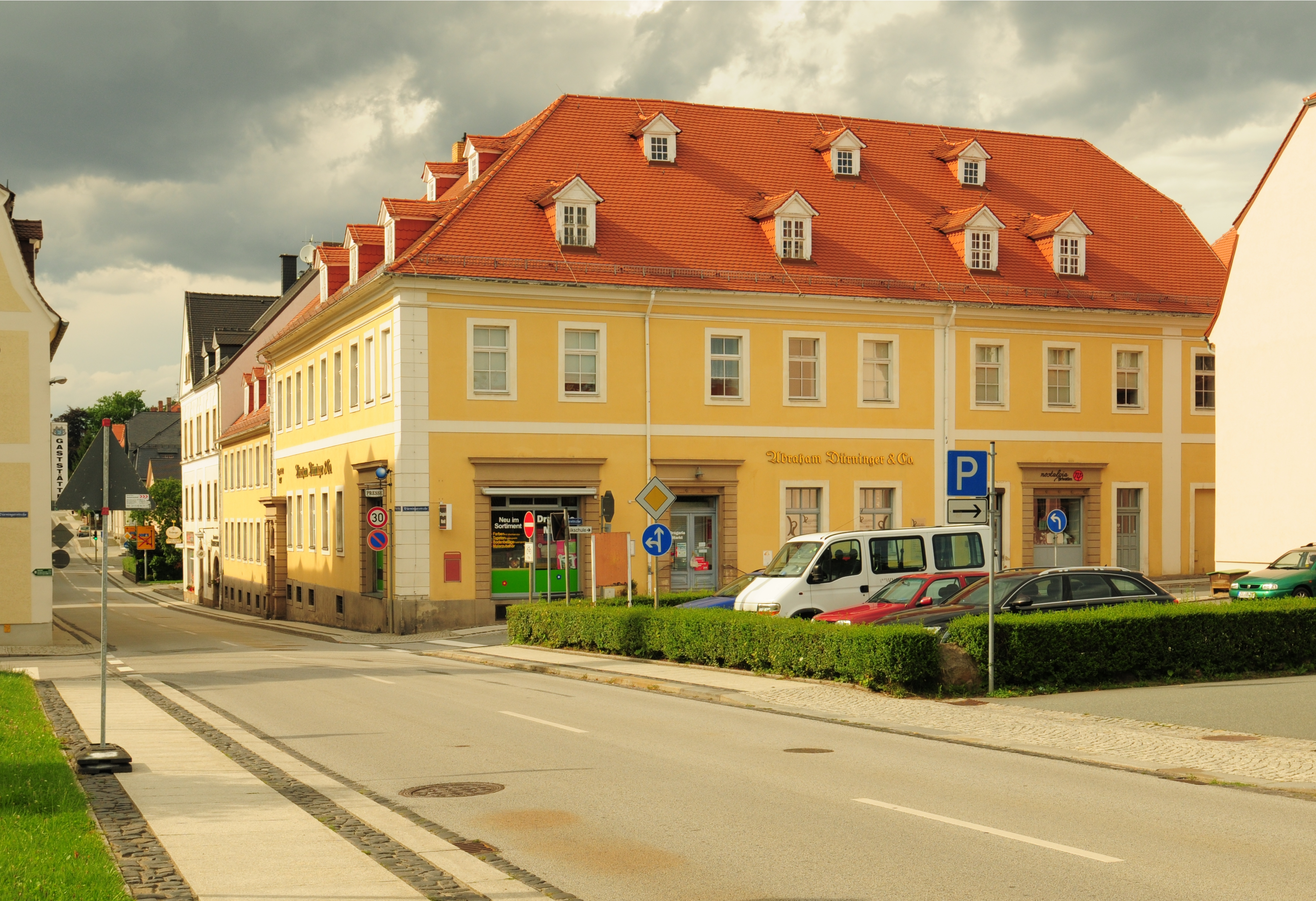 Herrnhut, Stammhaus Abraham Duerninger & Co. (Landkreis Görlitz, Sachsen, Deutschland)